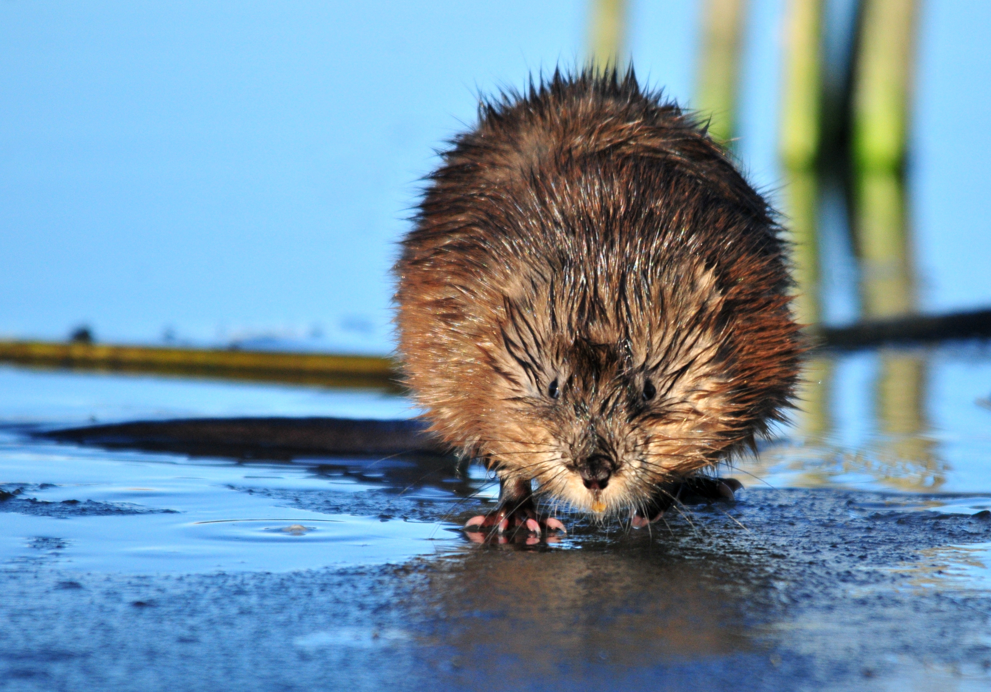 Photo: Tom Koerner/USFWS